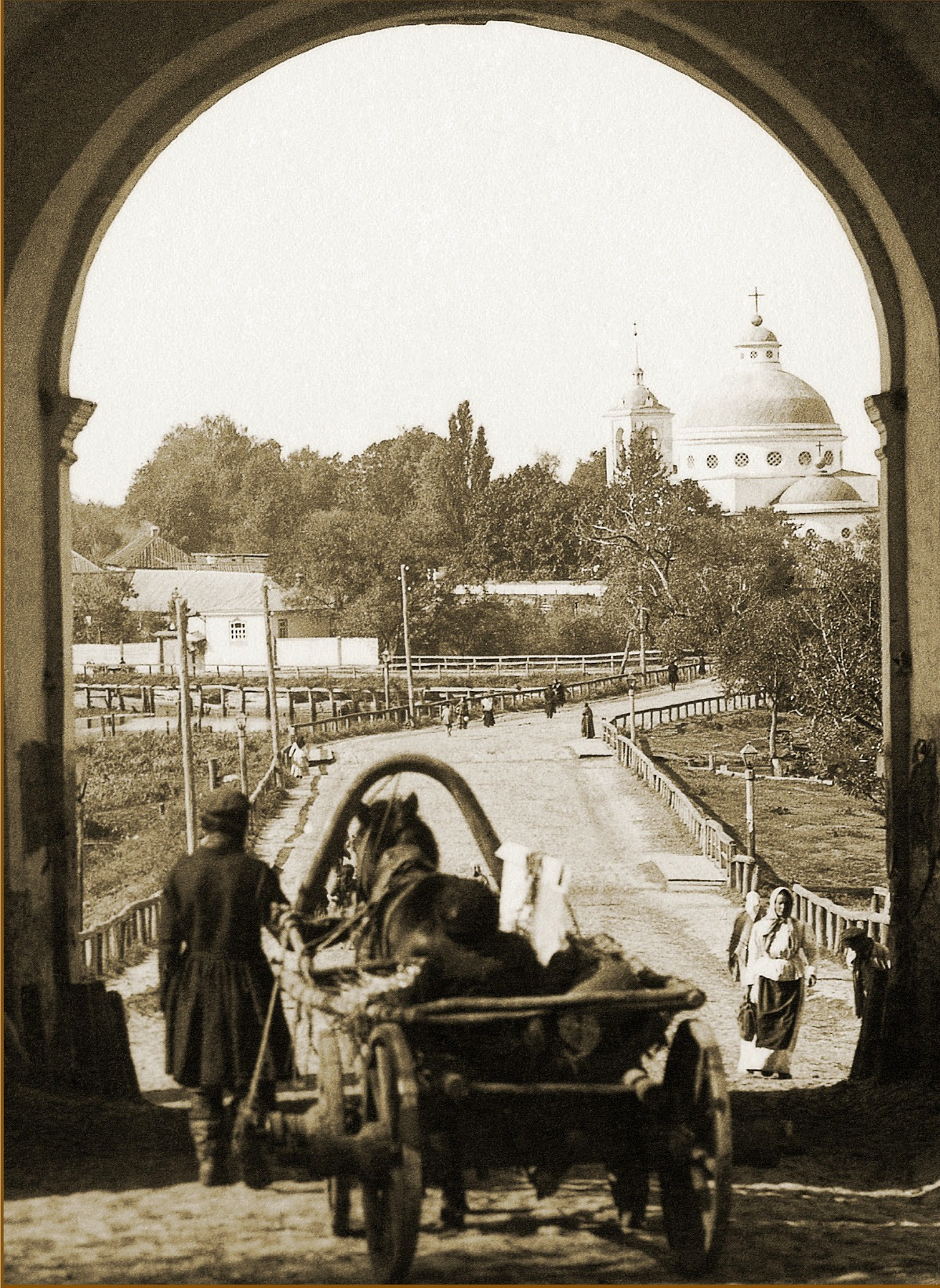 Церква Різдва Пресвятої Богородиці на Веригині у створі Київських воріт